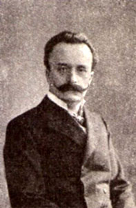 Karl Novacek (1868-1929)